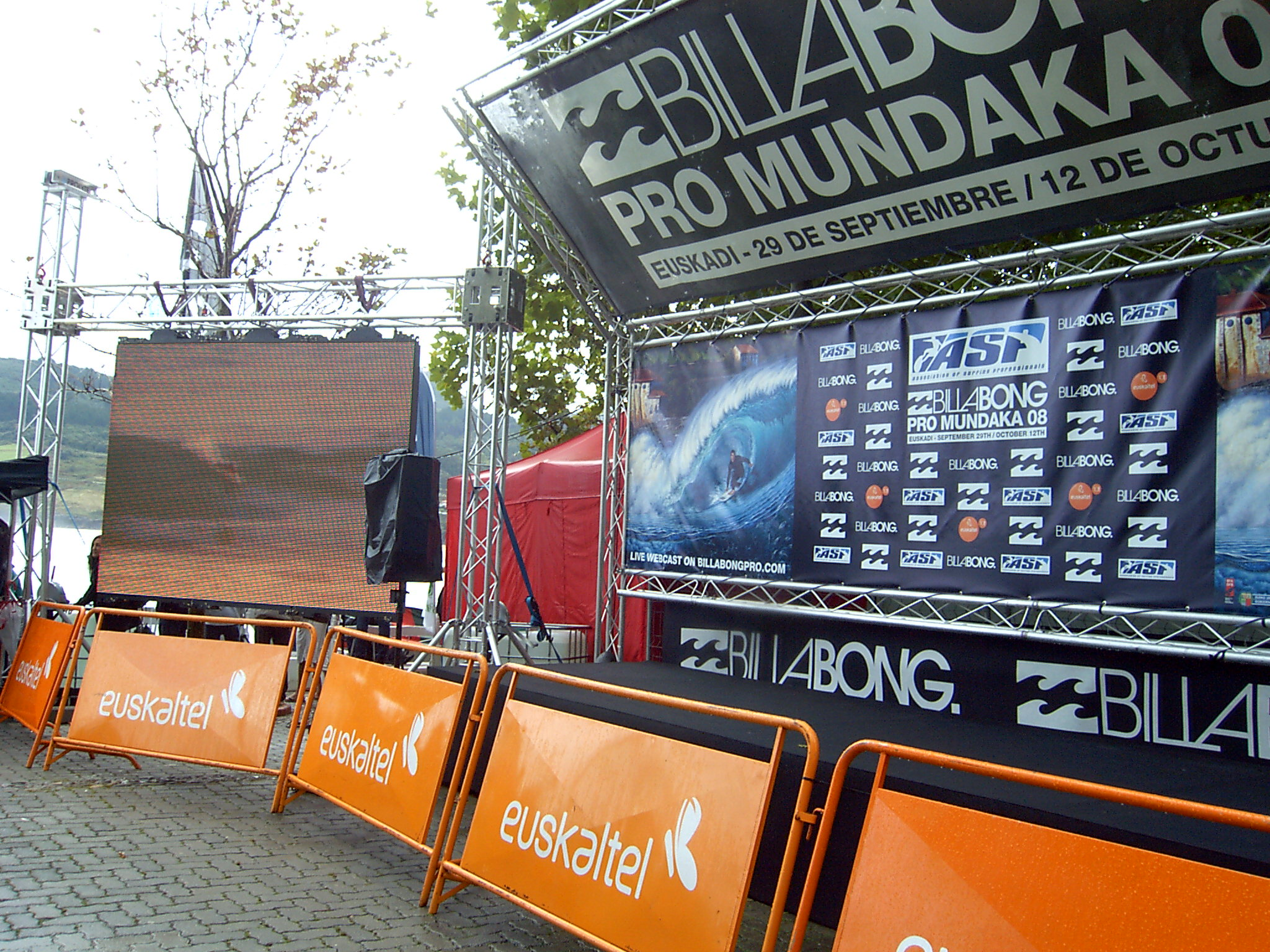 Mundakako surf txapelketa